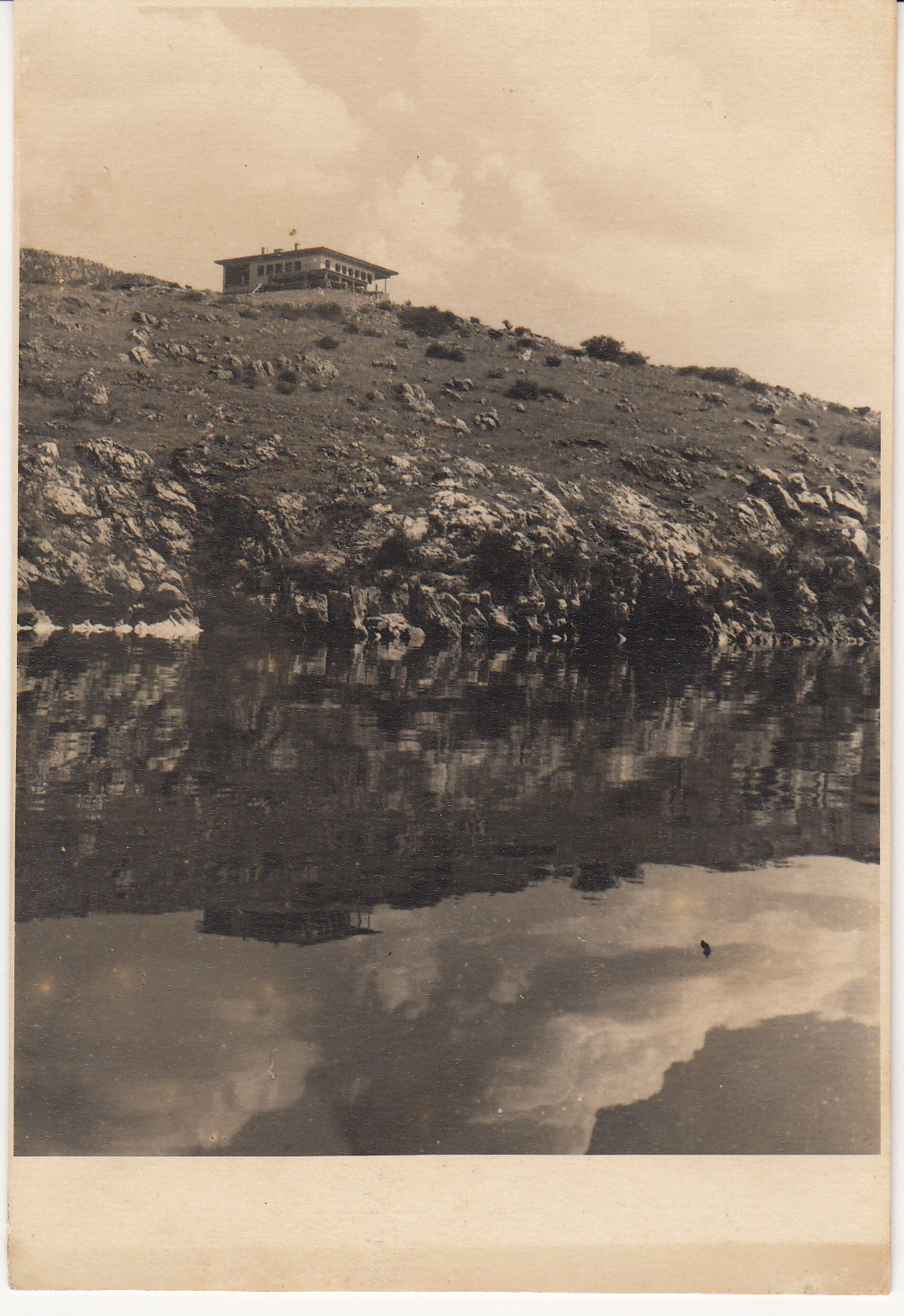 Vladimir Antolić vila na Ohridu